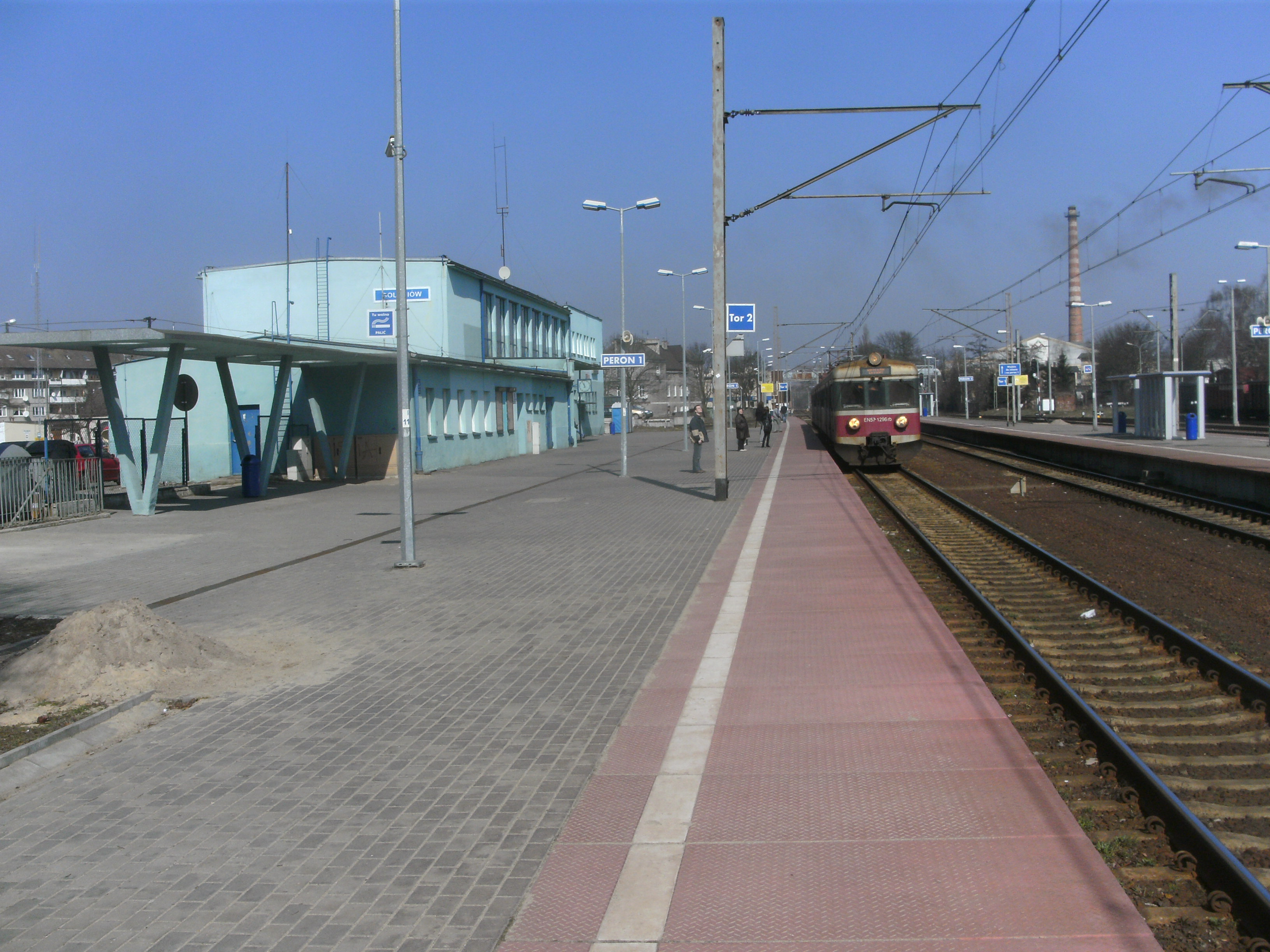 Dworzec w Goleniowie